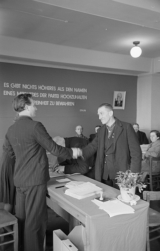 Original image description from the Deutsche Fotothek SED-Mitglied erhält sein SED-Mitgliedsbuch